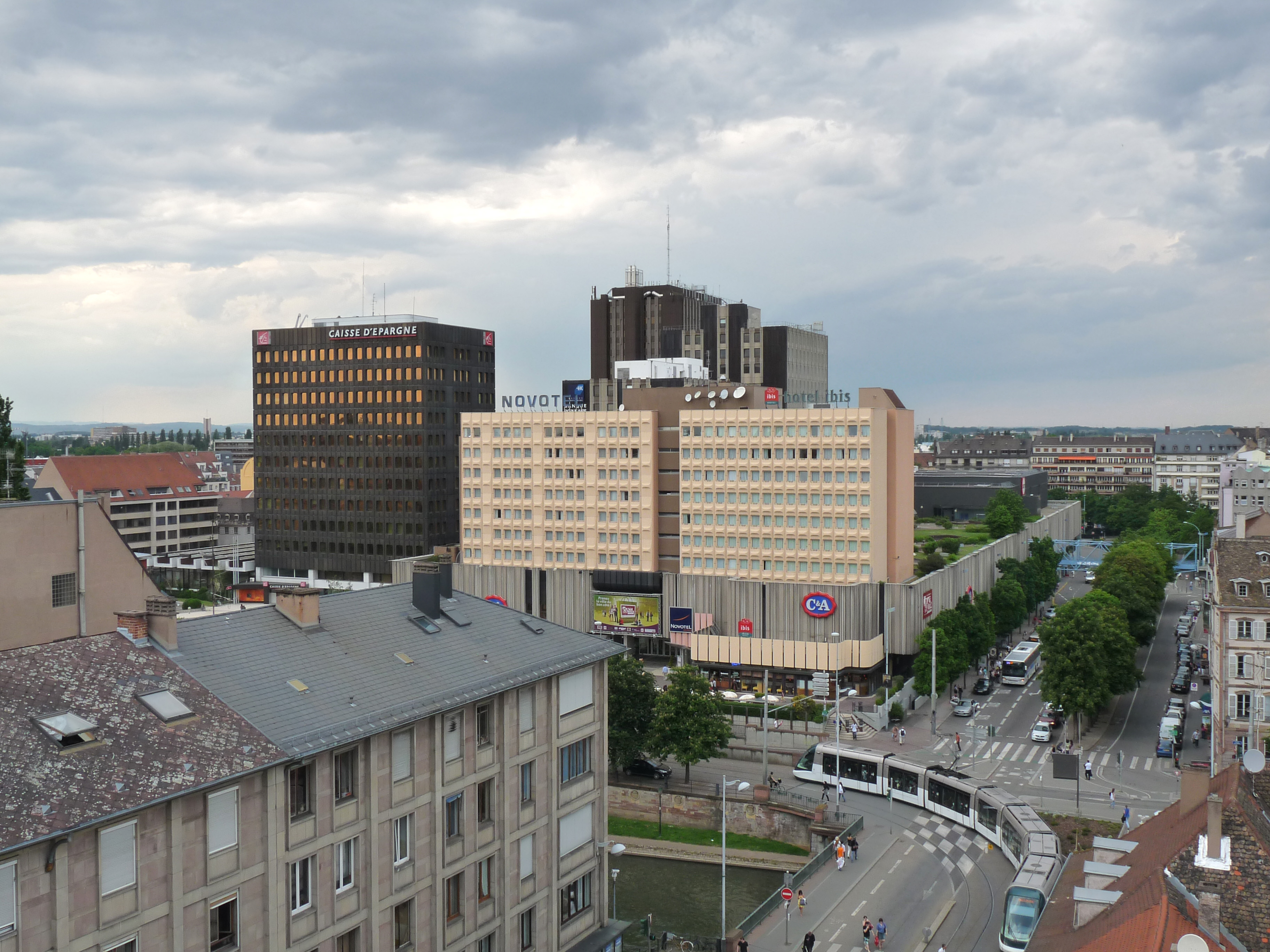 La Place des Halles de Strasbourg, vue depuis la terrasse panoramique du Printemps